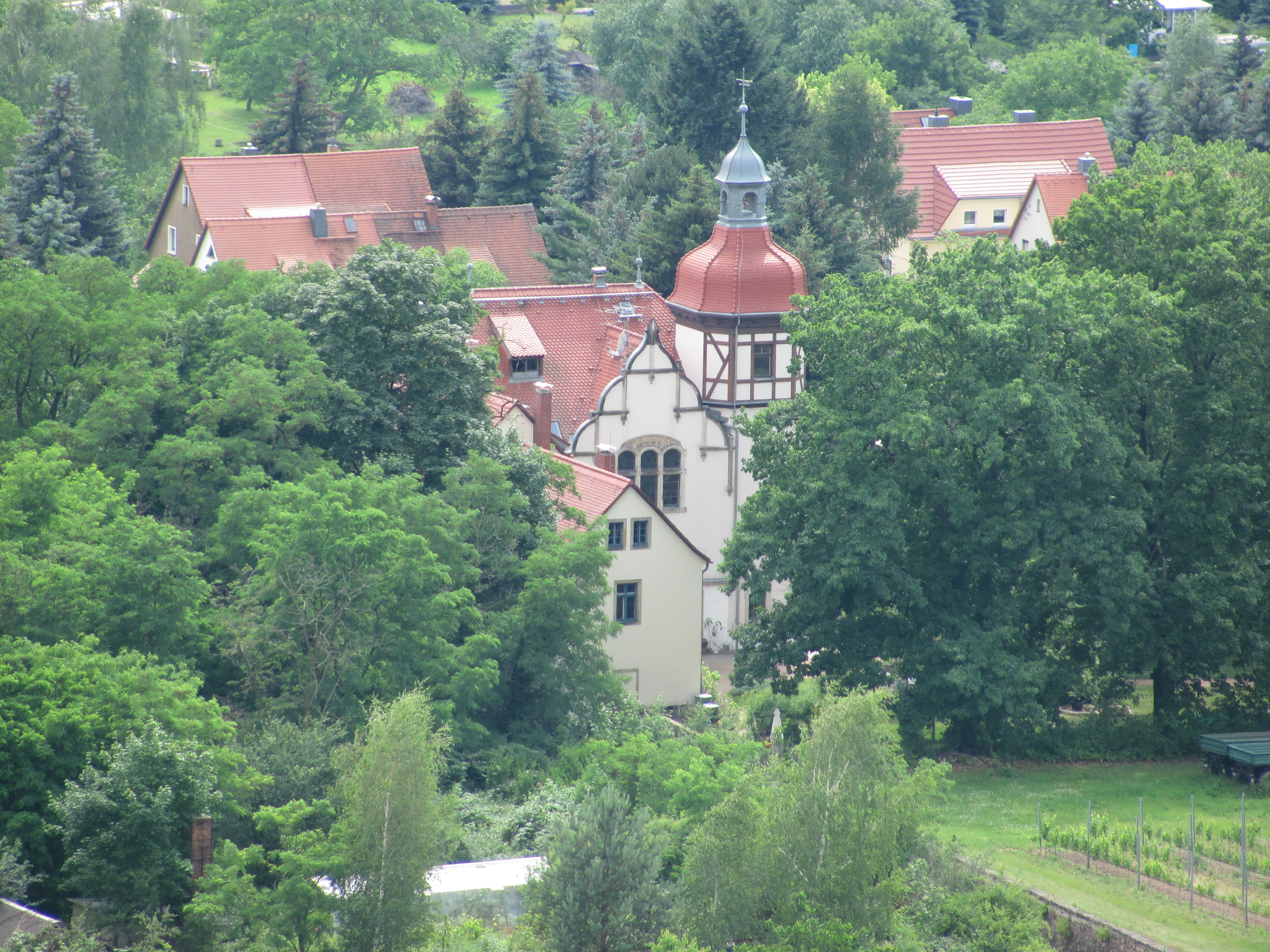 Radebeul Krapenburg von Zechsteinaussicht aus